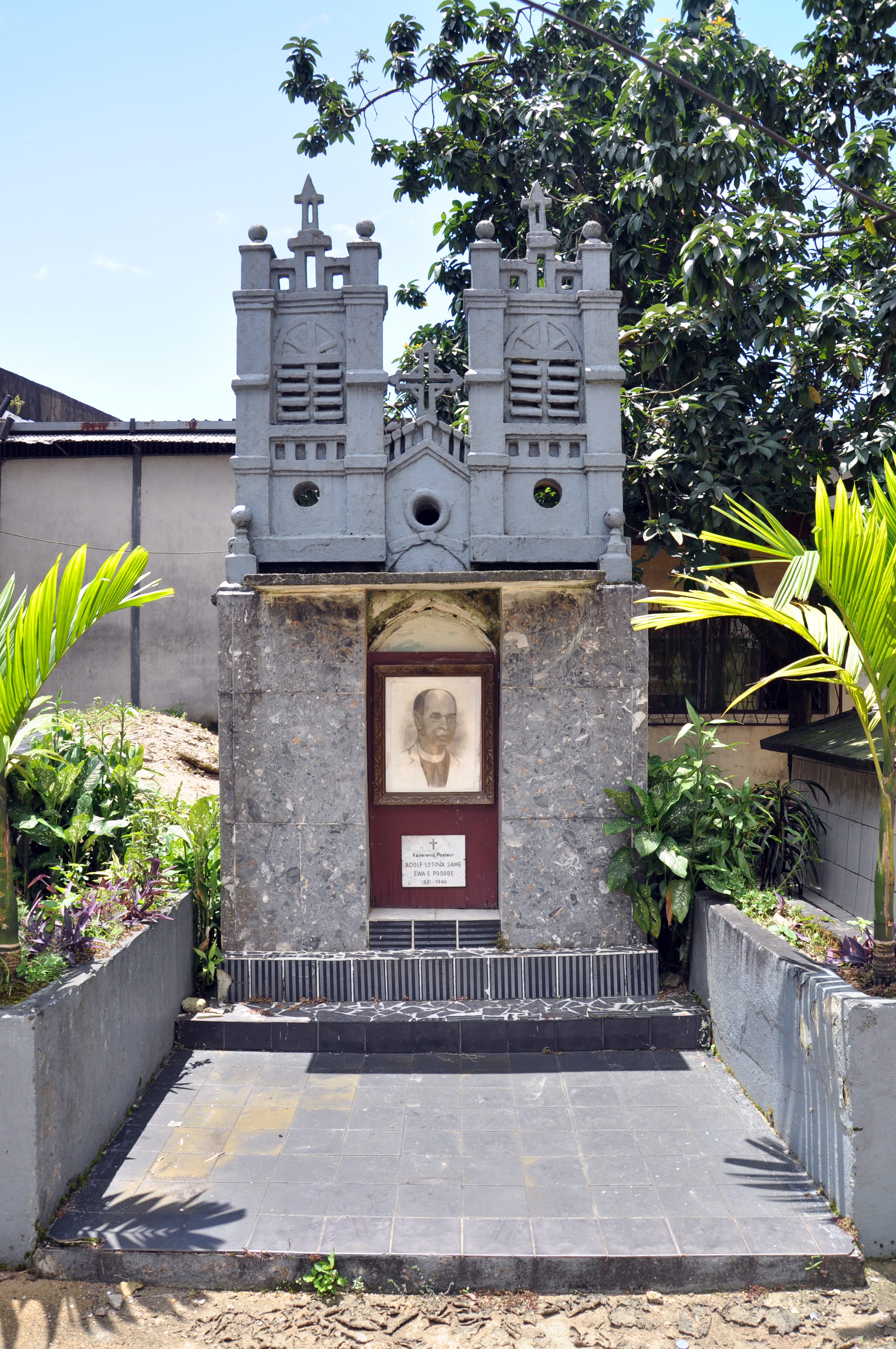 Tombeau du Pasteur Adolf Lotin'a Same